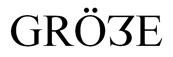 nicht durch Versalierung der Minuskel ß, sondern als Ligatur aus S und Z entstandenes großes Eszett, in Analogie zur Ligatur aus s und z beim kleinen Eszett.